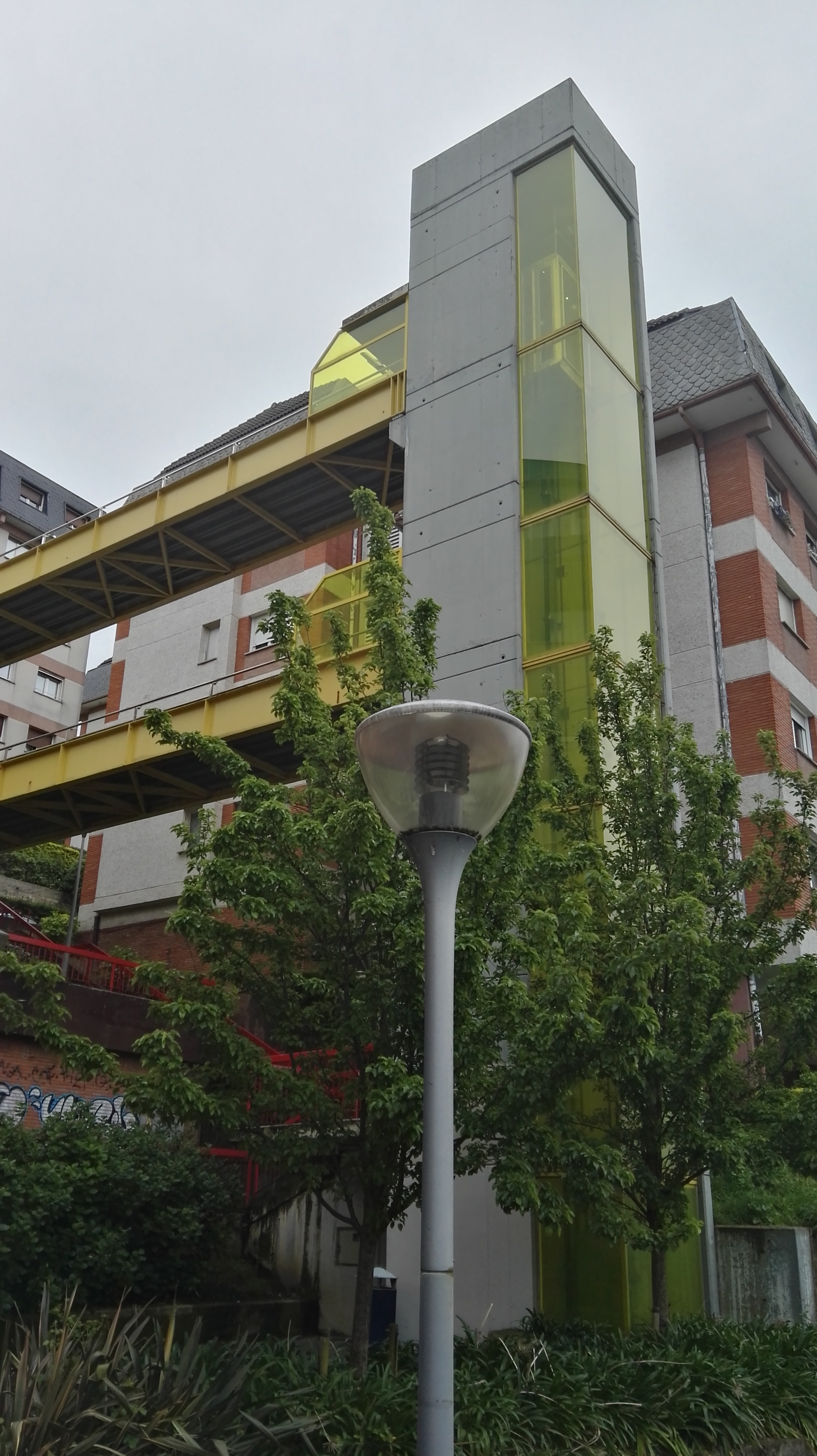 Aizkorri kaleko igogailua